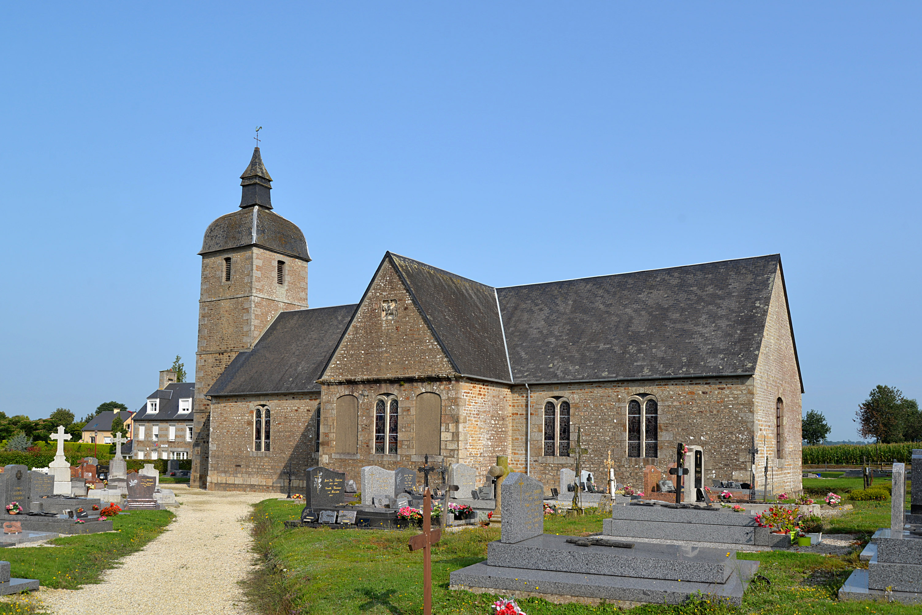 Saint-Martin-le-Bouillant (Manche)